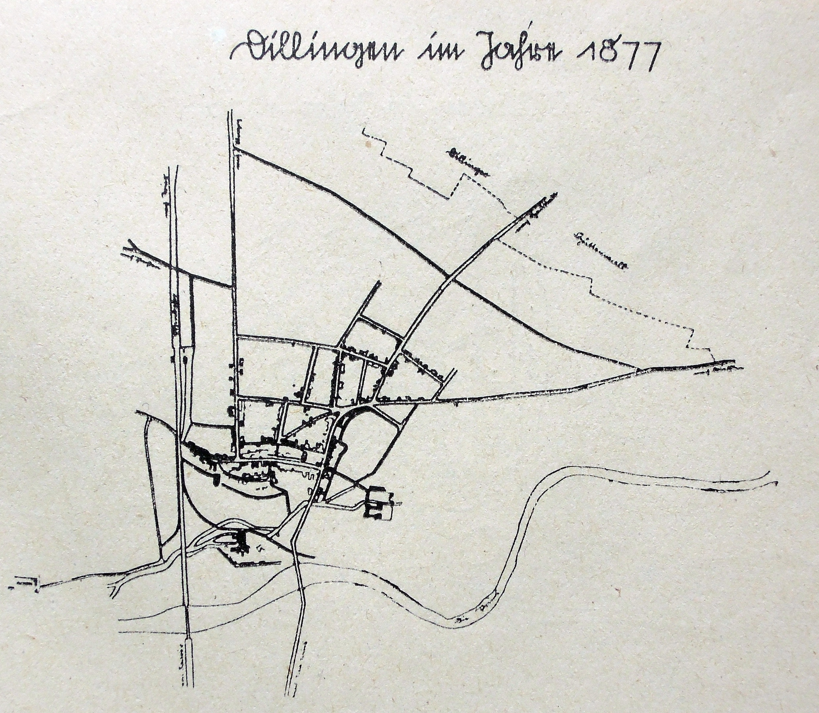 Karte von Dillingen/Saar im Jahr 1877